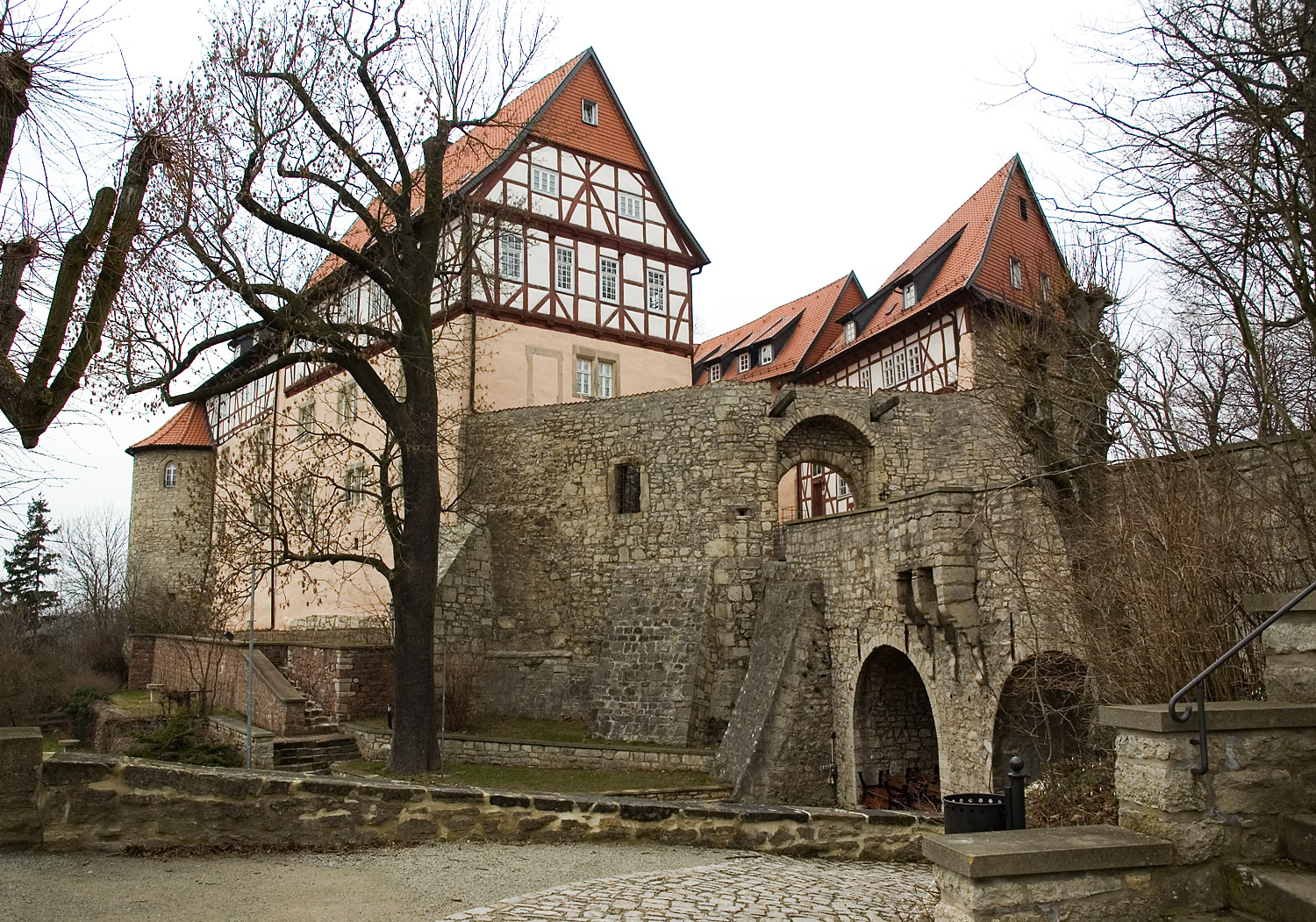 Castle Bodenstein, Germany